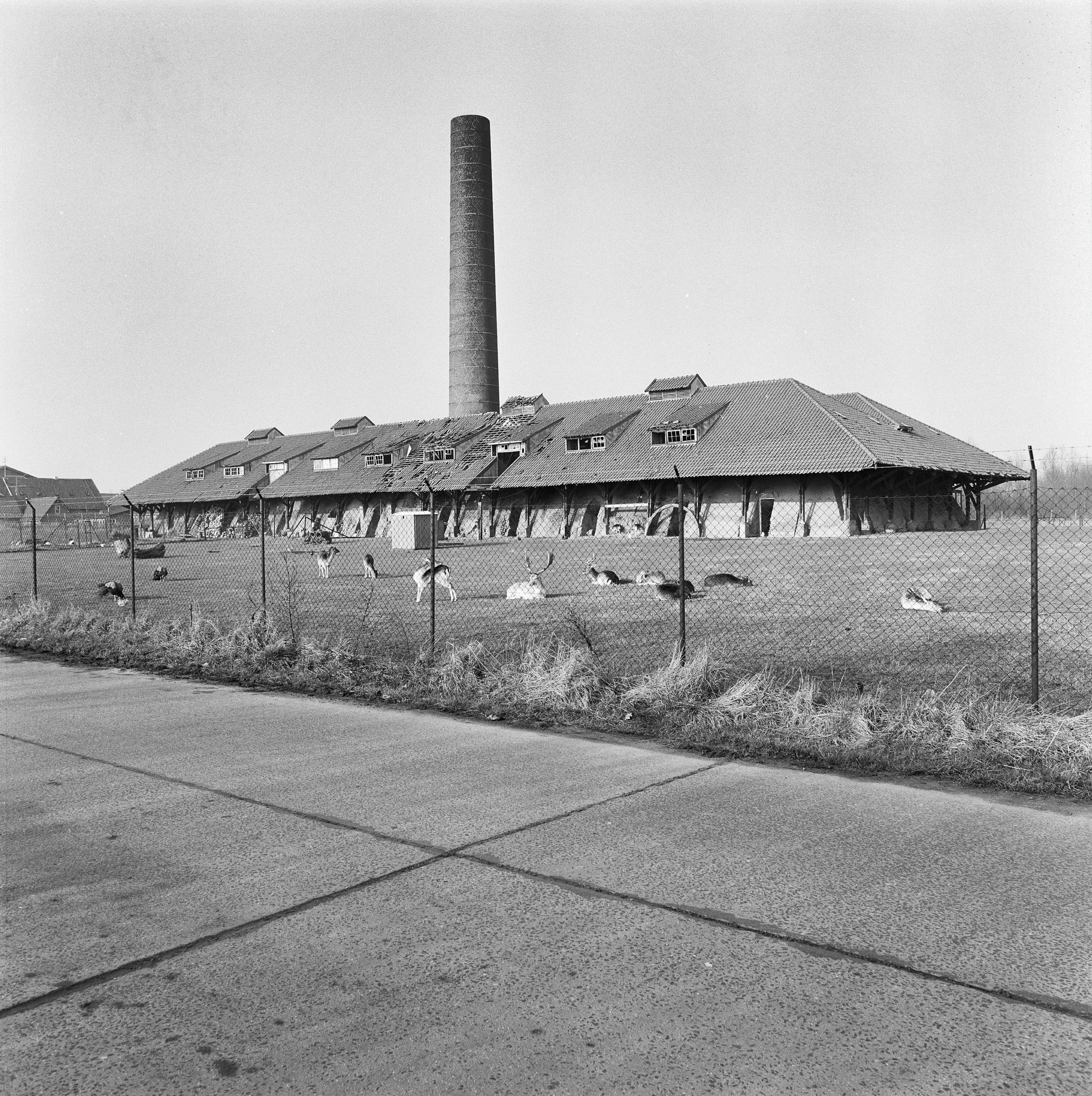 BAKSTEENFABRIEK 'DE BLAUWE KAMER': Exterieur OVERZICHT